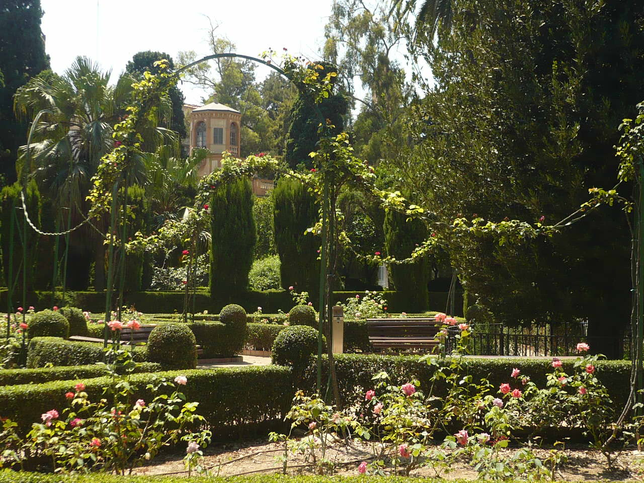 Jardin Monforte de Valencia